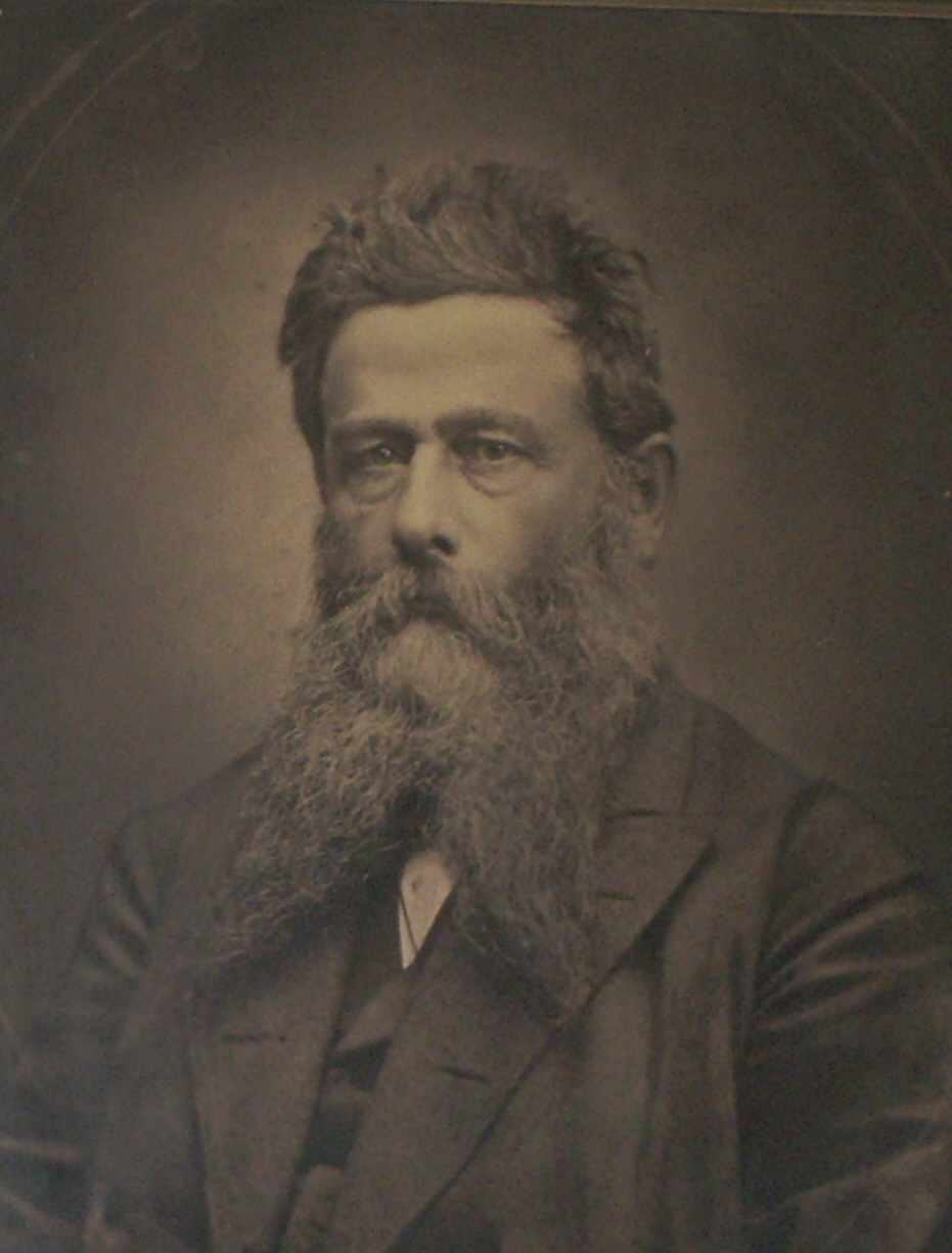 Ludwig Meyn (1820-1878), deutscher Agrarwissenschaftler, Bodenkundler, Geologe, Journalist und Mineraloge. Er war der Pionier der Erdölförderung.